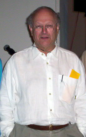 Glenn Murcutt en el III Encuentro de Arquitectura y Urbanismo Tropical, noviembre 2004, San José, Costa Rica